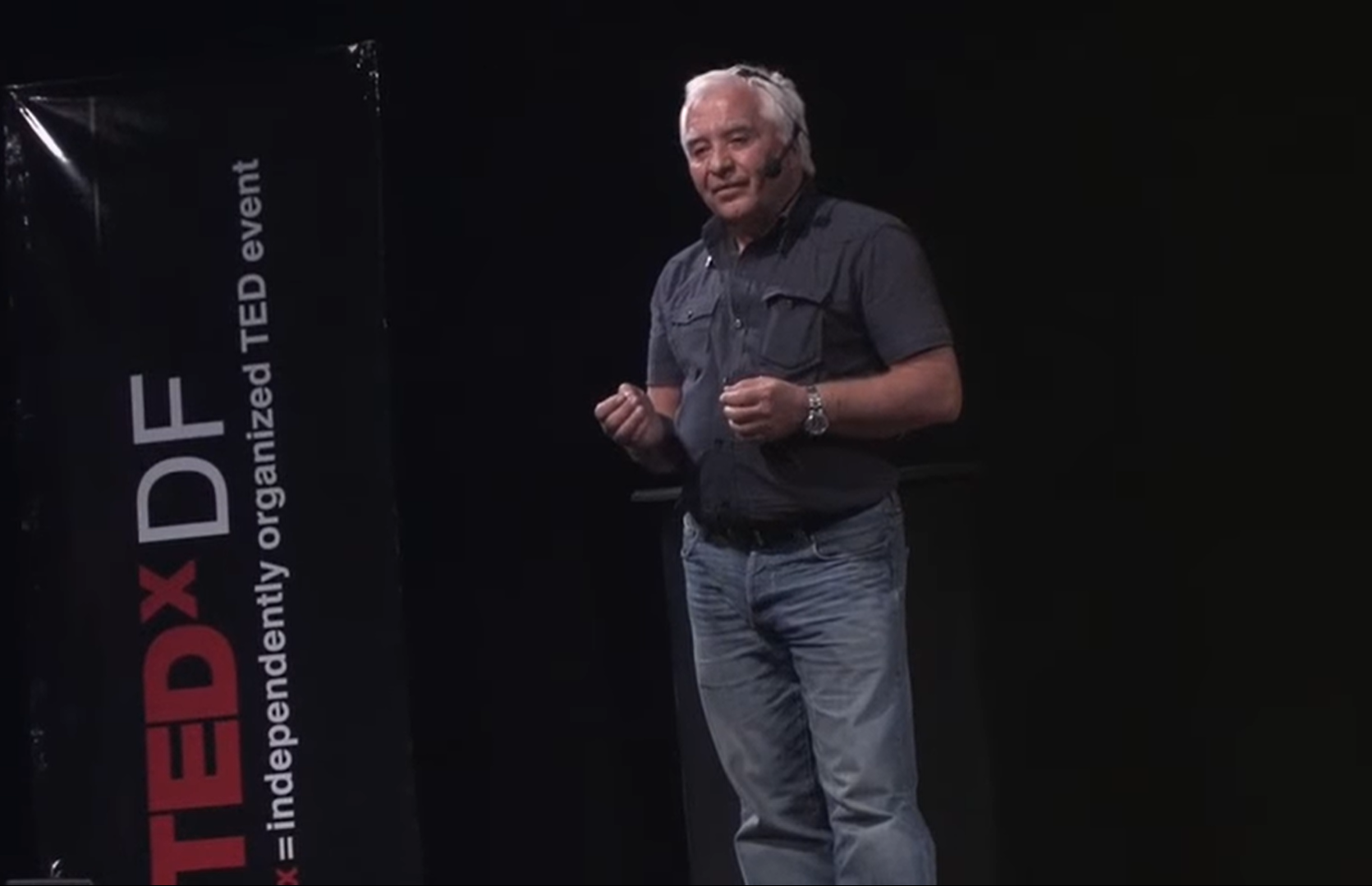 Dr. Alfredo Careaga realizando una participación en TEDx Talks